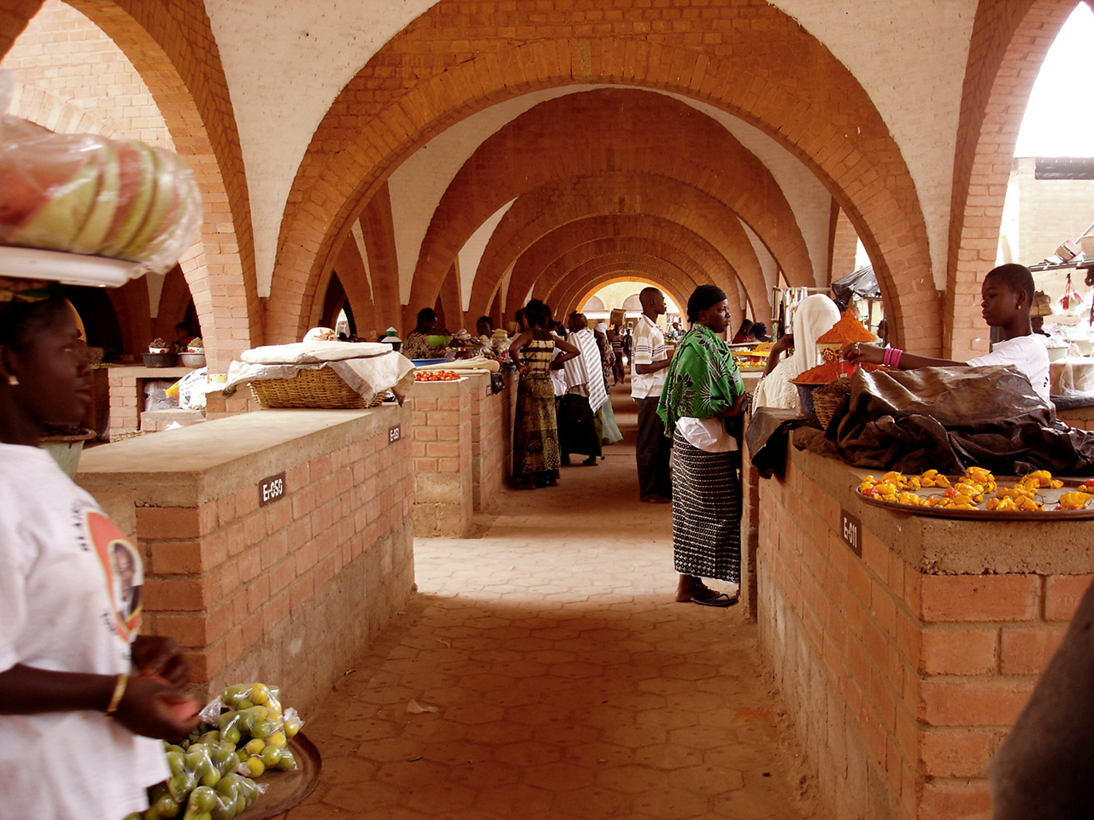 vue du Grand marché de Koudougou construit en 2005